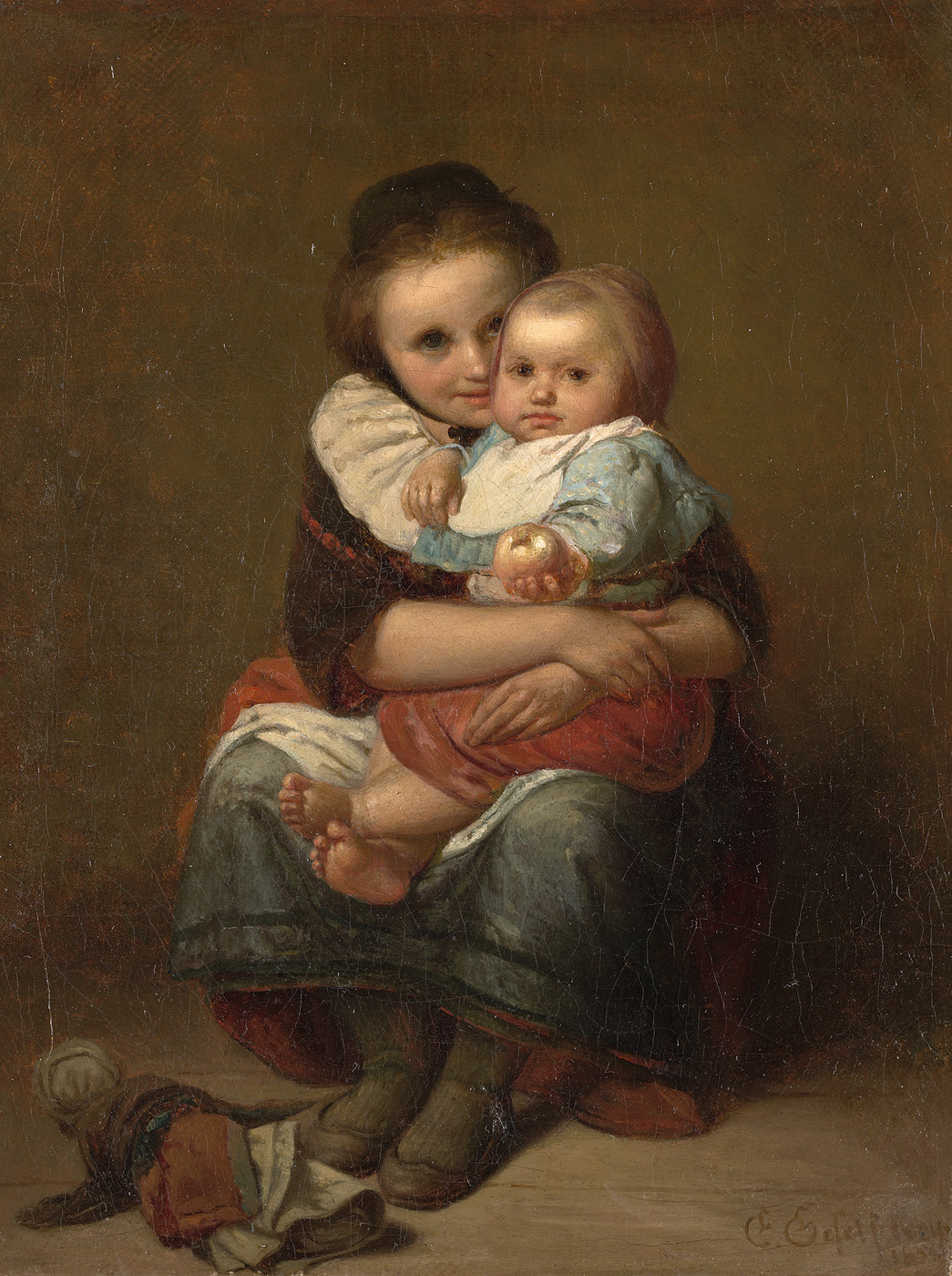 schilderij; portret; kinderportret